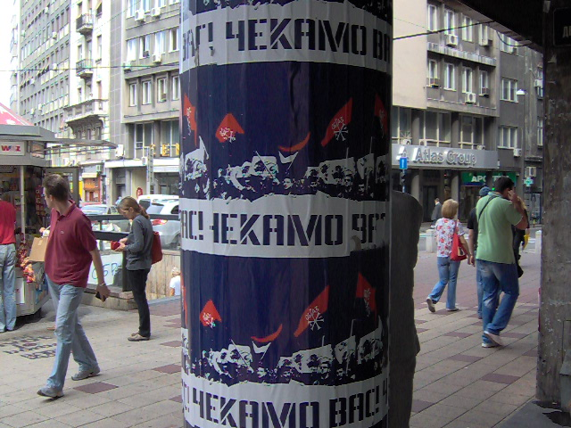 Плакати Образа са поруком упућеном учесницима Београдске параде поноса - "Чекамо вас!"